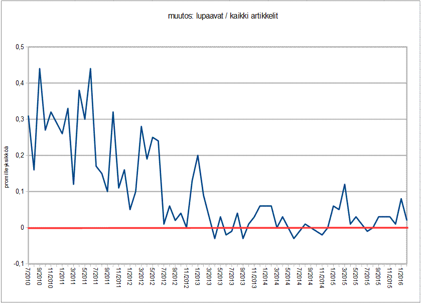 muutos lupaavien suhde kokonaisartikkelimäärään kuukausittain 6/2010-2/2016